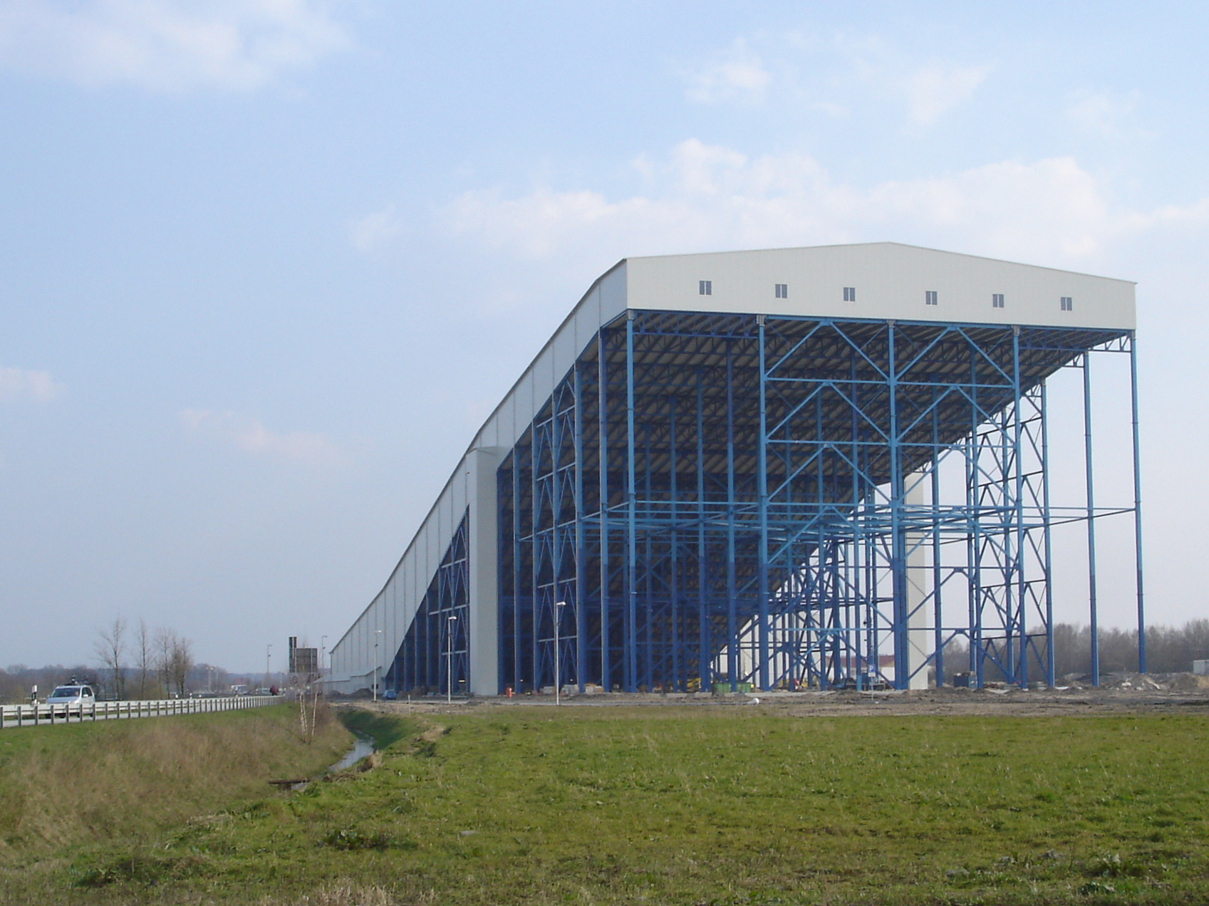 Snowfunpark in Wittenburg (Mecklenburg-Western Pomerania)